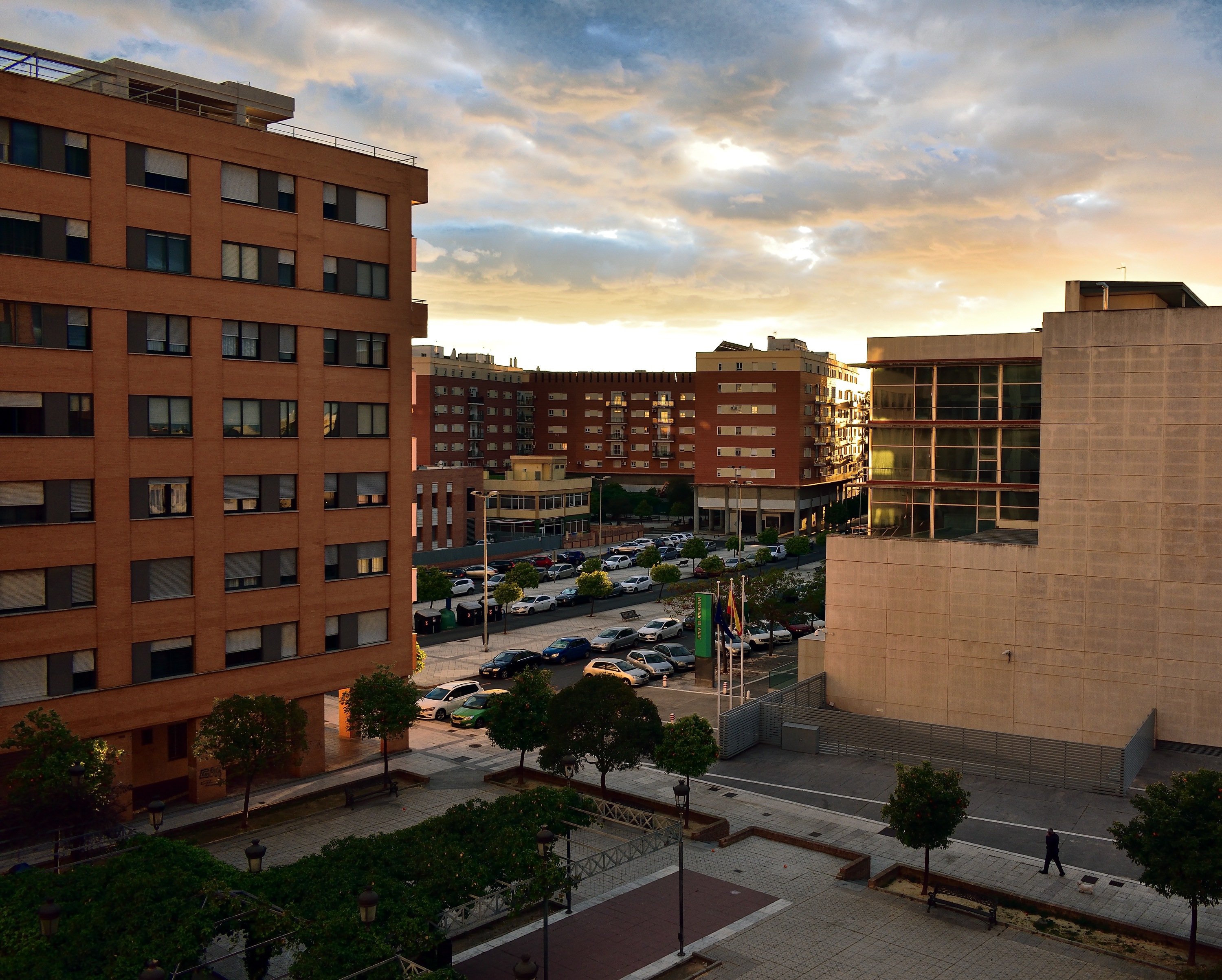 Barrio de Zafra (Huelva), al atardecer. A la derecha, edificio de la Junta de Andalucia.